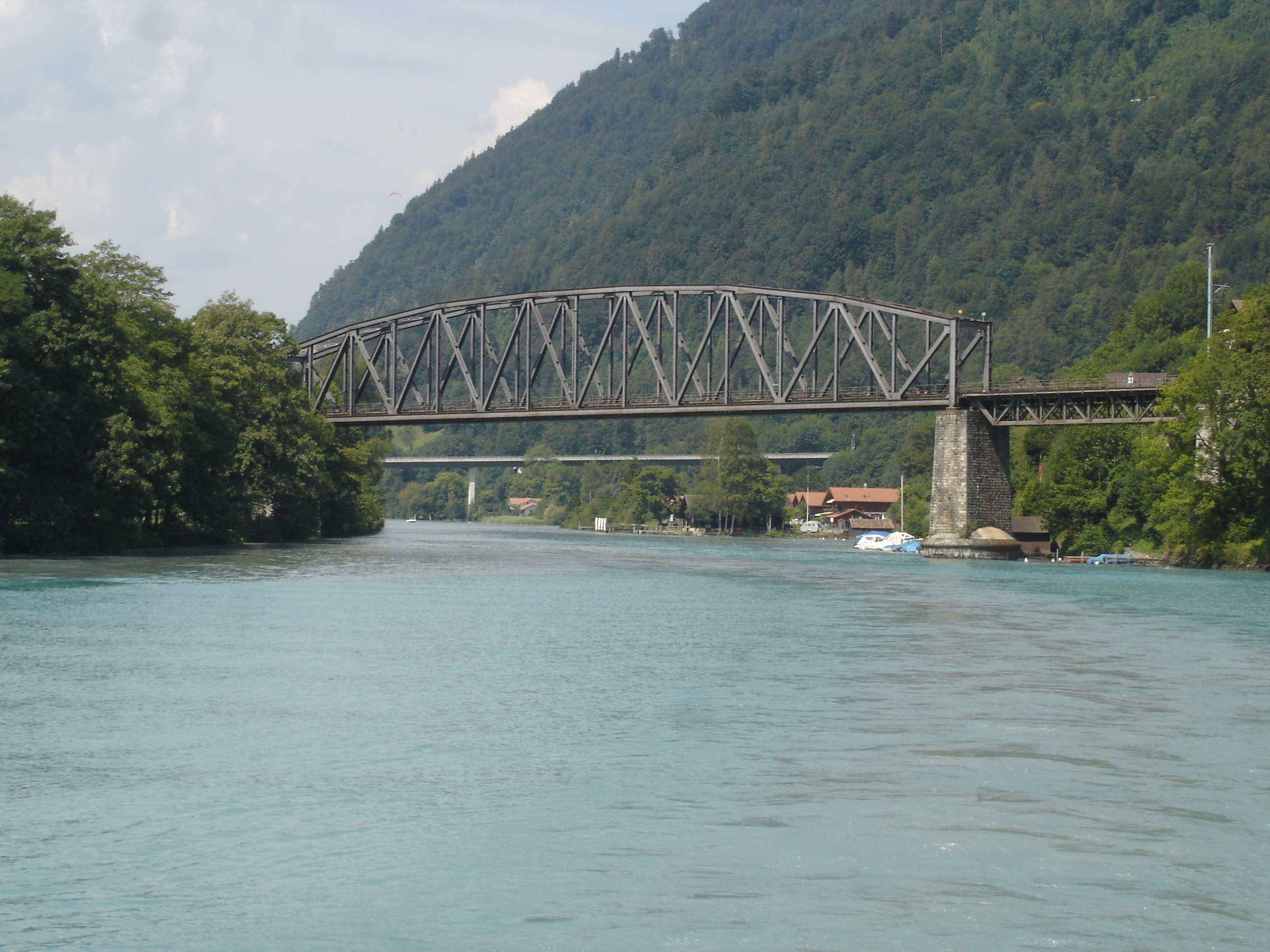 Stahlbrücke der Zentralbahn, welche bei Interlaken über die Aare führt. Länge des gesamten Bauwerks: 165 Meter, Länge des Hauptträgers: 92,8 Meter.